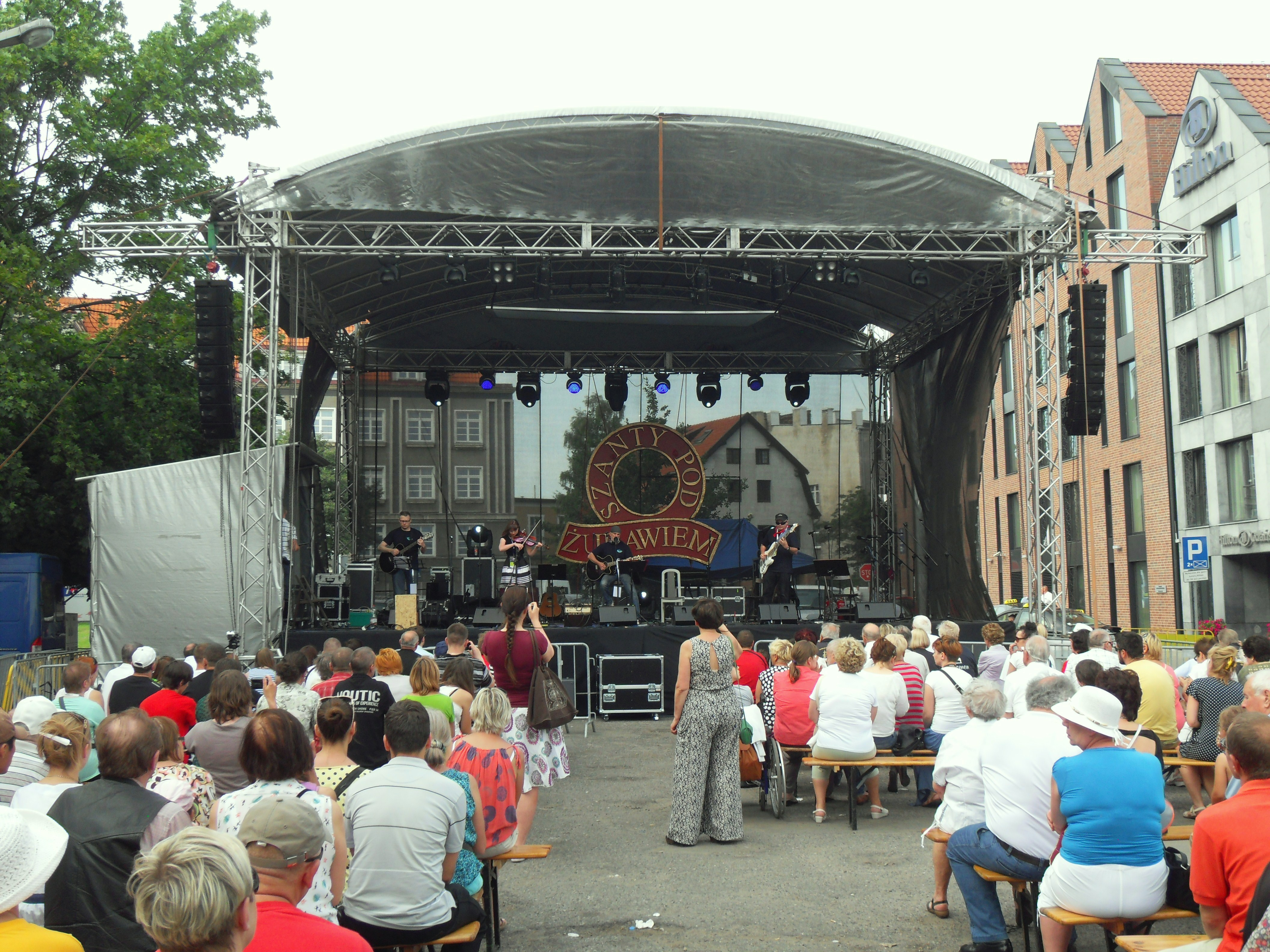 Gdańsk Główne Miasto, Targ Rybny, "Szanty pod Żurawiem".